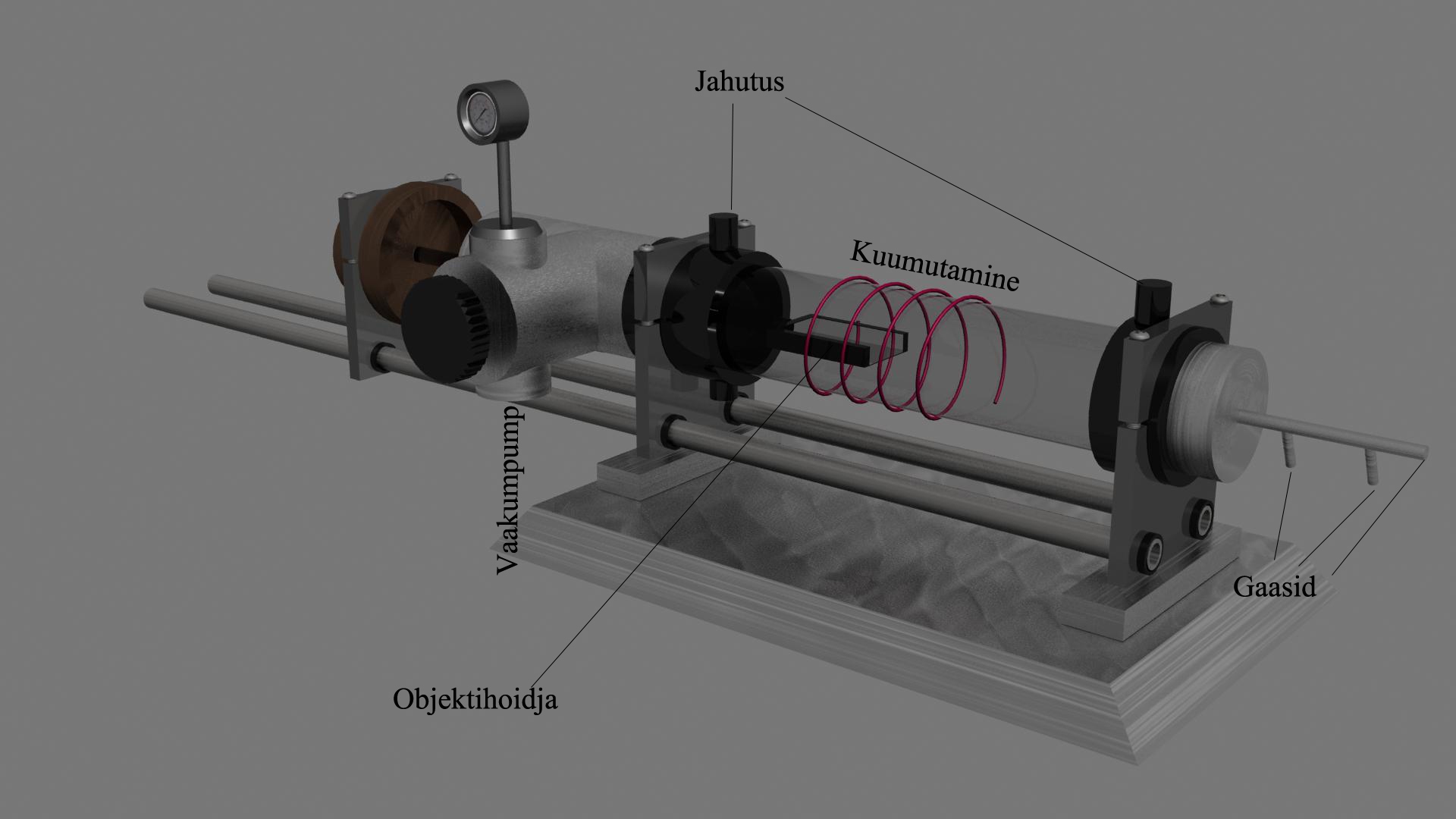 CVD reaktori 3D kujutis